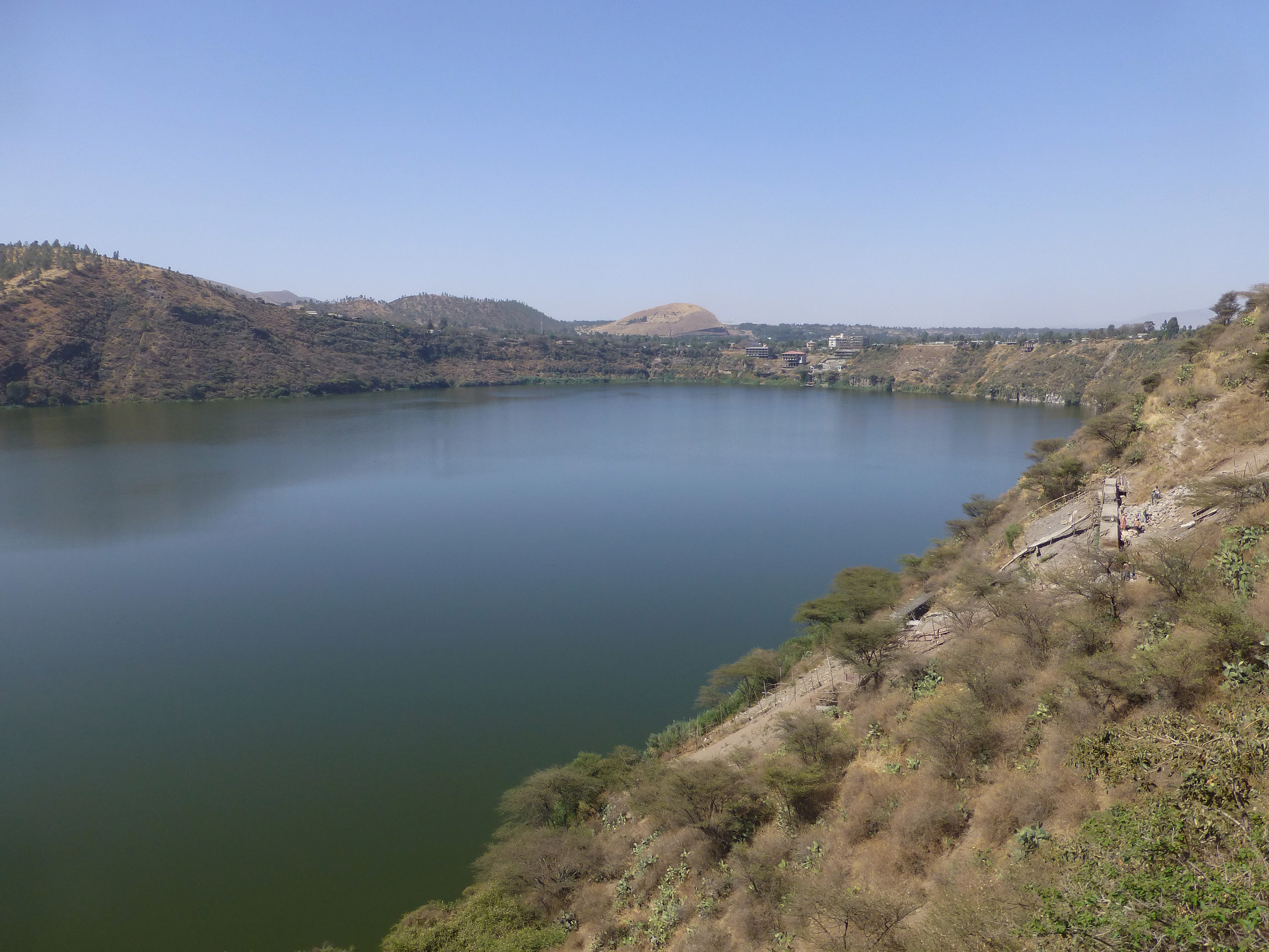 Lac de cratère Bishoftu (près de Debre Zeit, Oromia, Ethiopie)